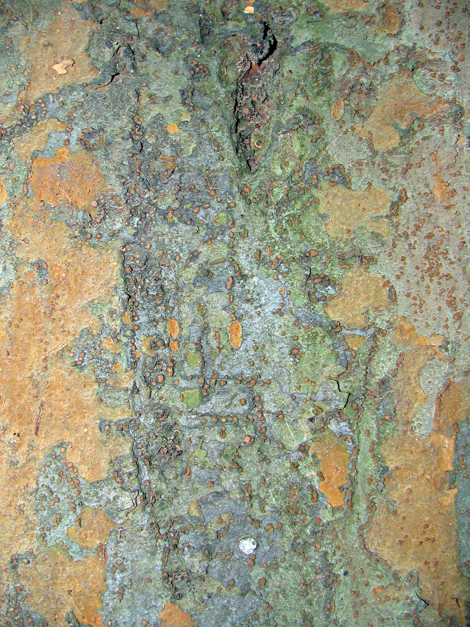 Кора кавкаске зелкове, Арборетум, Београд (аутор Михаило Грбић).